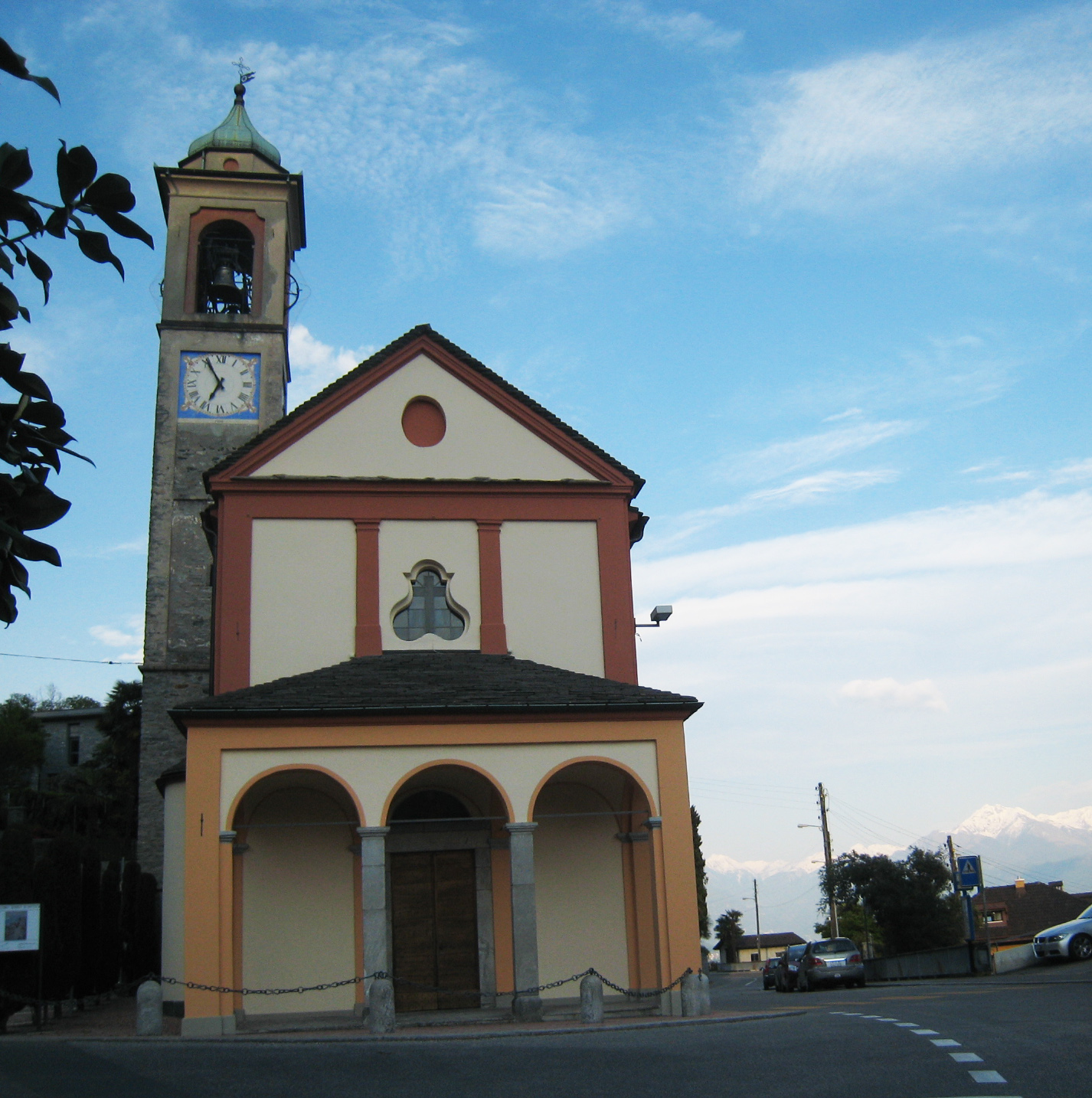 Chiesa parrocchiale di San Bernardo a Orselina